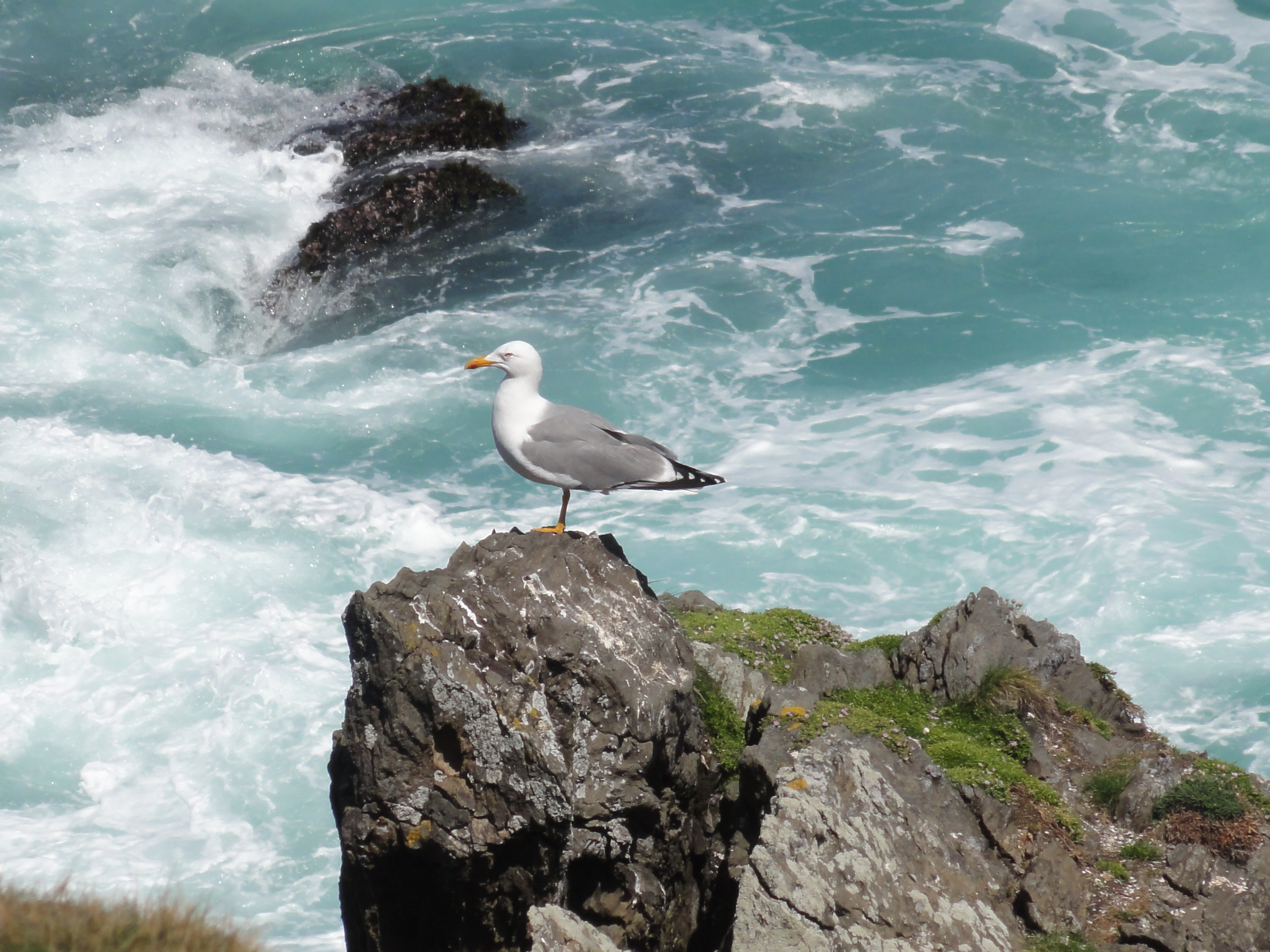 Costa de Dexo con gaviota This is a photography of a Site of Community Importance in Spain with the ID: ES1110009. Natura2000 entry, EEA entry